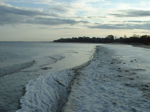 Strand von Jurmala, Lettland im Winter (Blick Richtung Nordost)